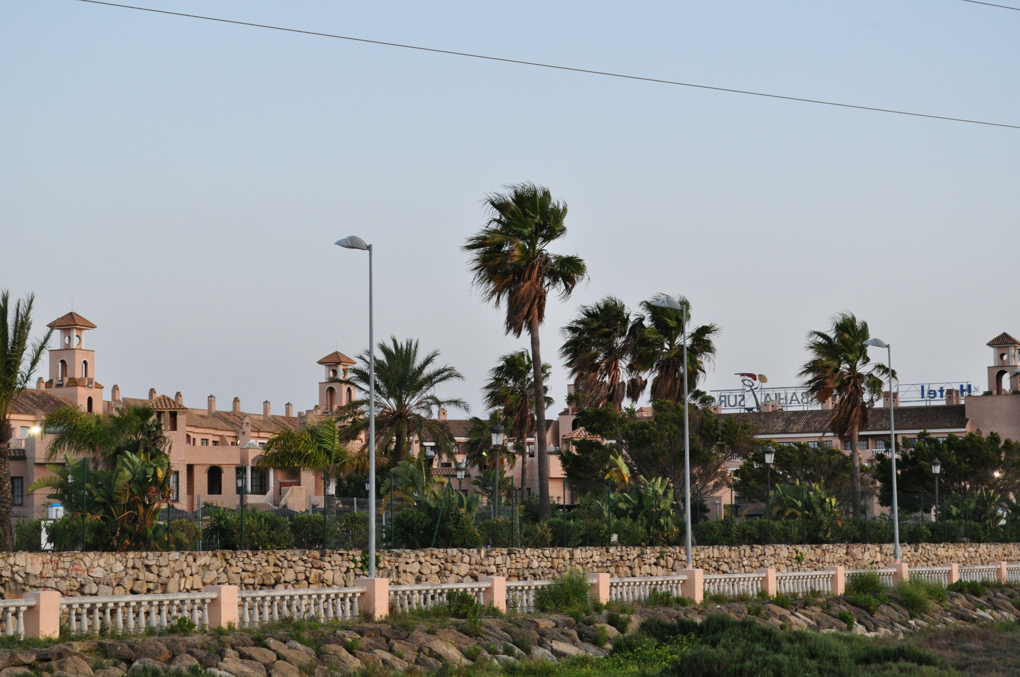 Centro comercial Bahia sur en San Fernando Cádiz, tomada desde el observatorio de las salinas, al atardecer.